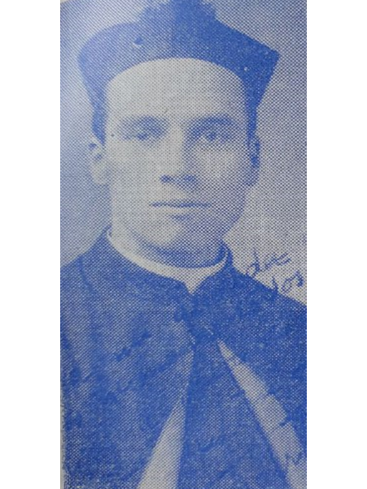 Fotografía tomada en Roma el día de su ordenación sacerdotal.